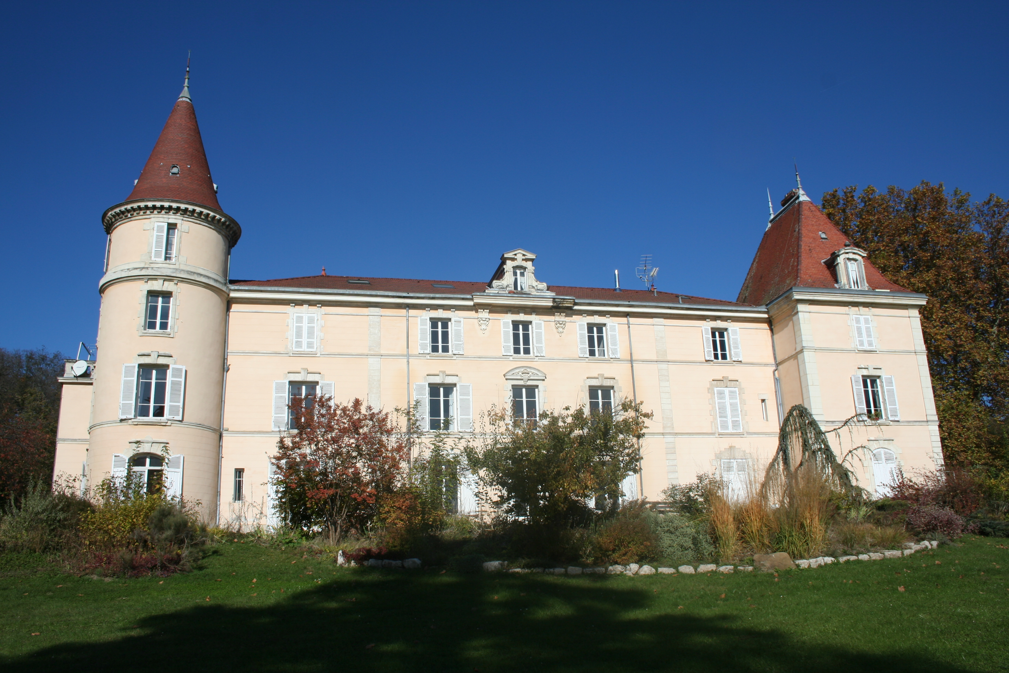 Voiron (Isère) - Château de la Brunerie - CREPS Rhône-Alpes.